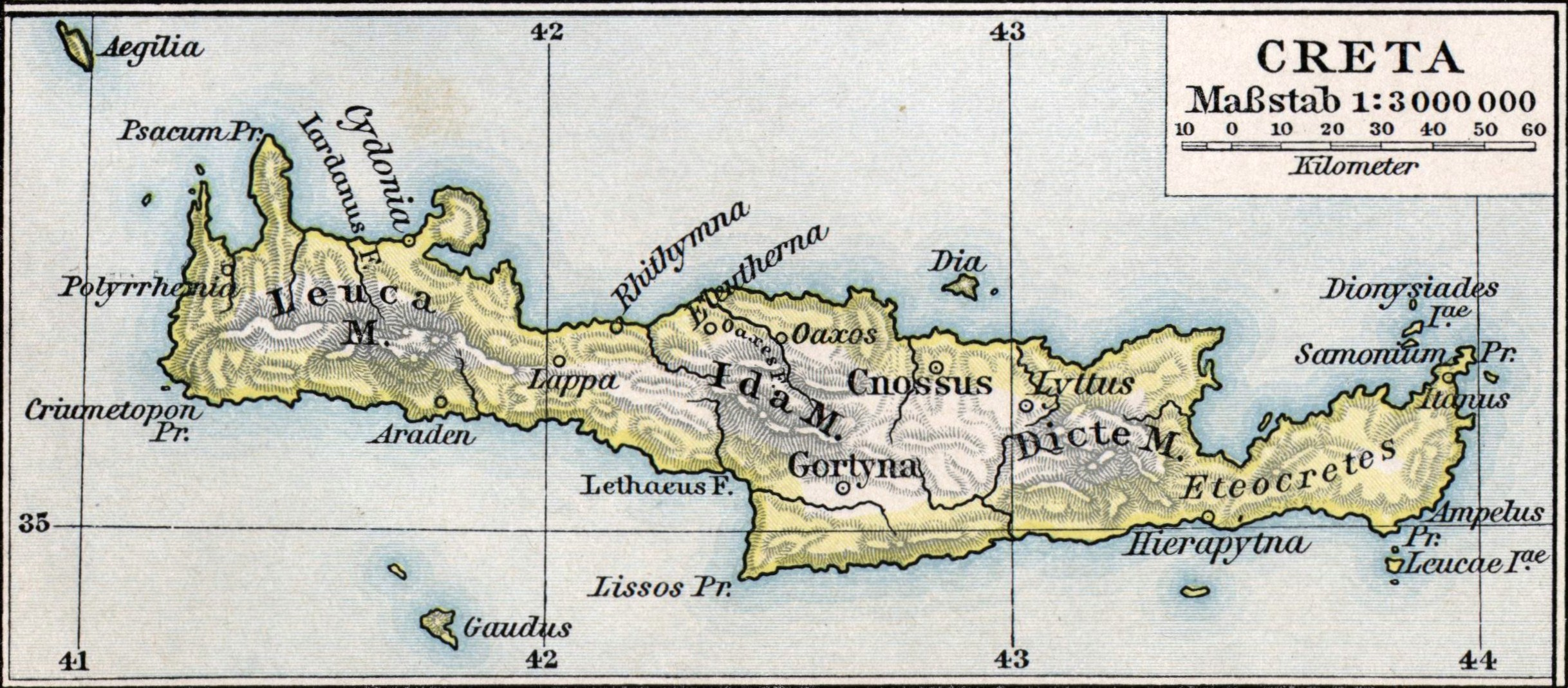 Karte der Insel Kreta in der Antike mit lateinischen Ortsnamen.